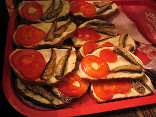 Бутерброд